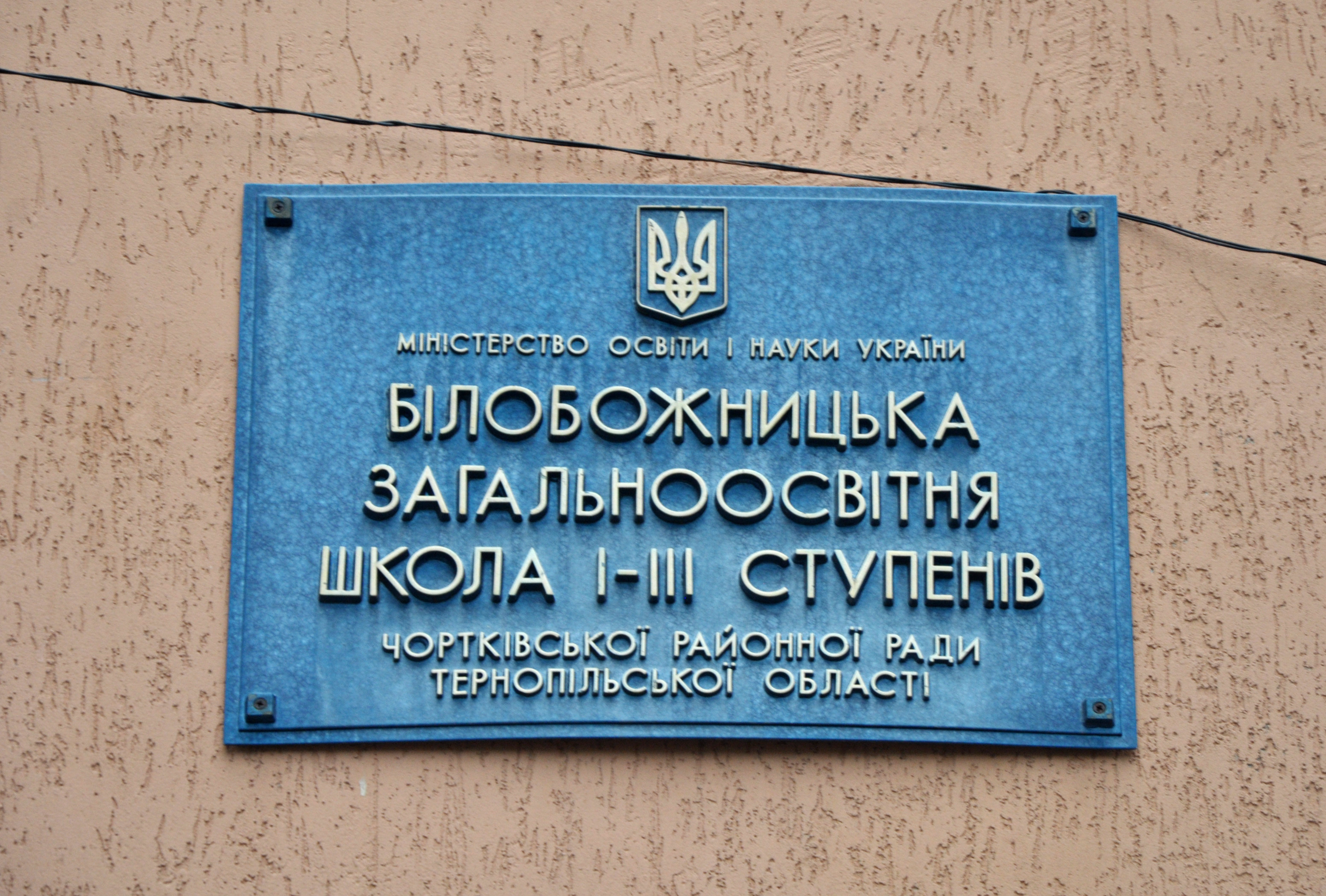 Вивіска на школі у селі Білобожниці Чортківського району Тернопільської області України.